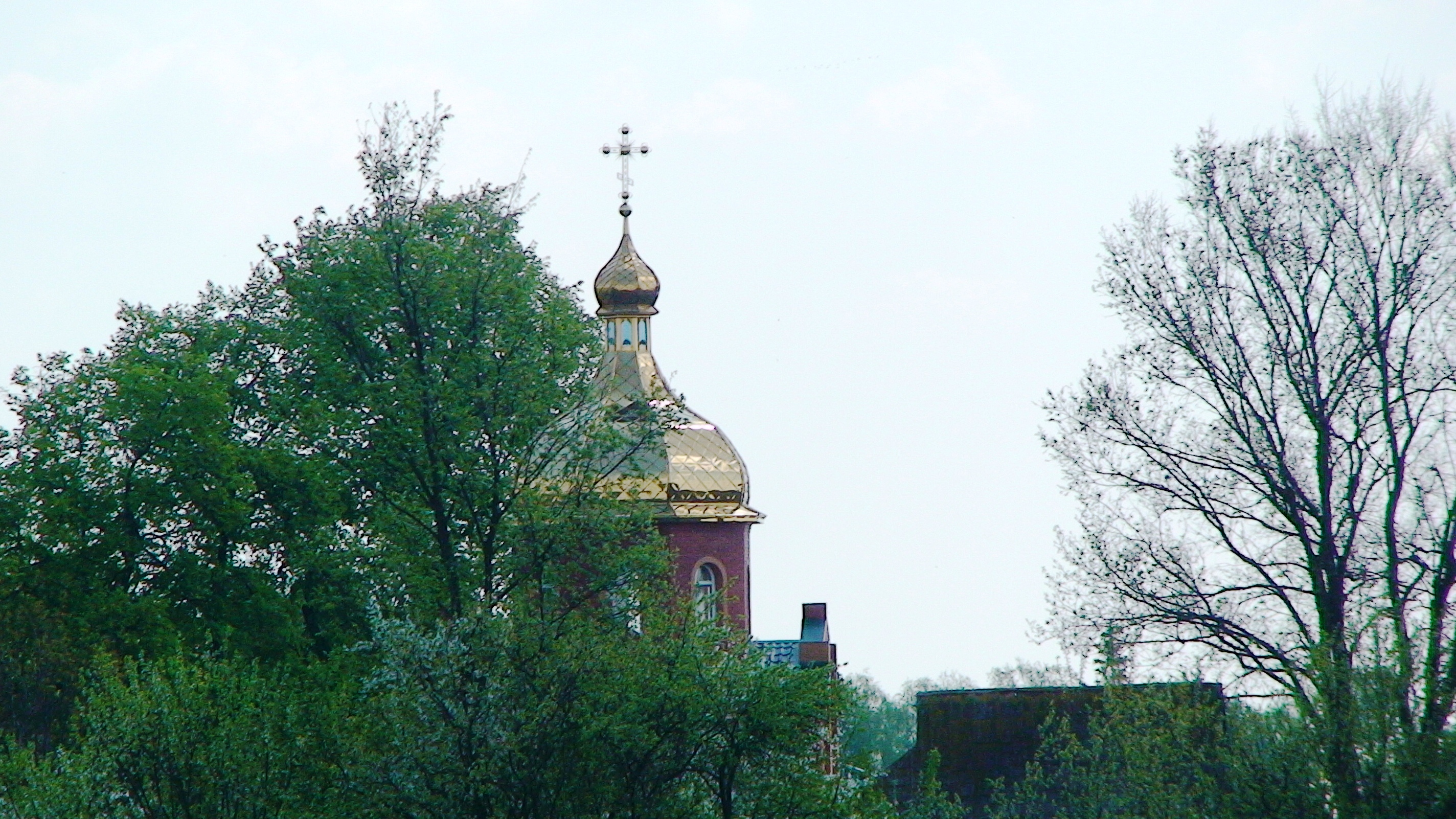 Церковь